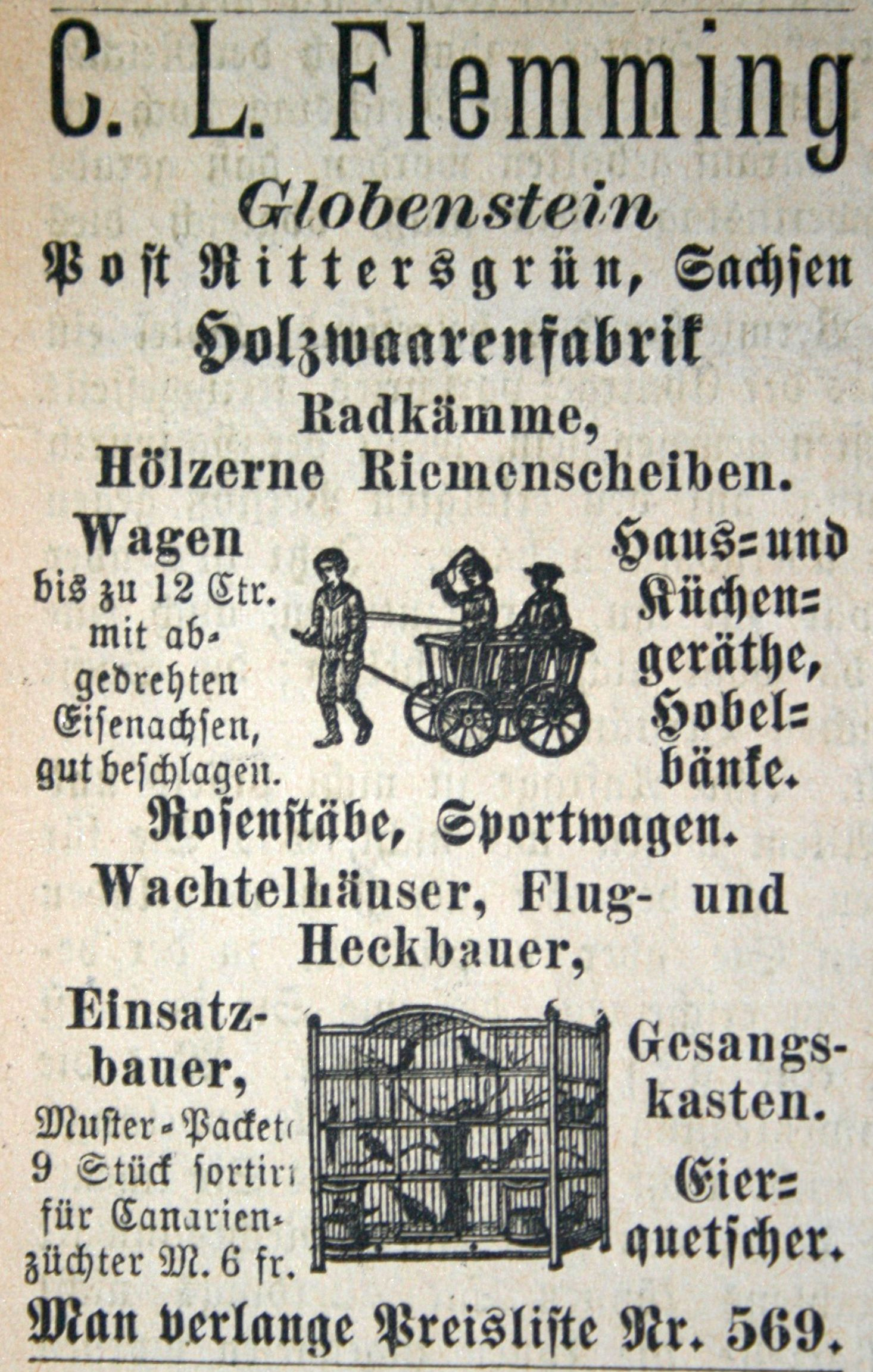 Für ihre Holzprodukte warb die von dem aus Schönheide im Erzgebirge stammenden Bürstenmacher Carl Ludwig Flemming gegründete Firma in zahlreichen Zeitungen, hier eine Anzeige im Schönheider Wochenblatt im Jahr 1898.